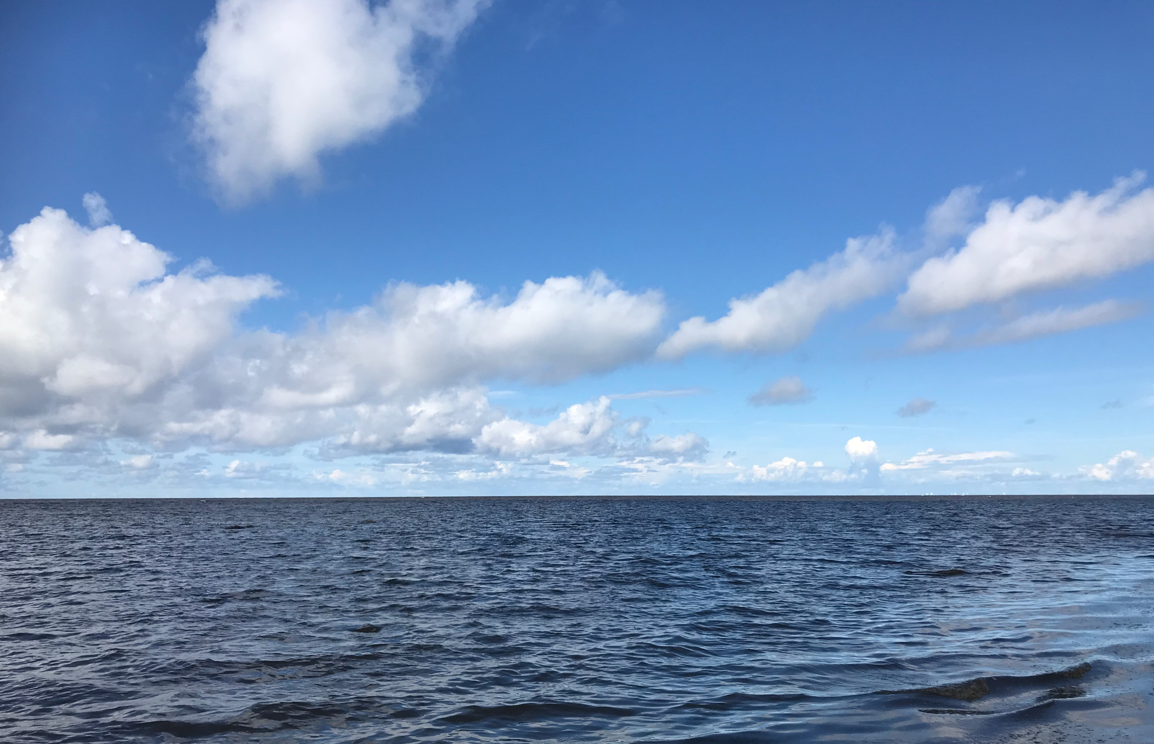 Рижский залив